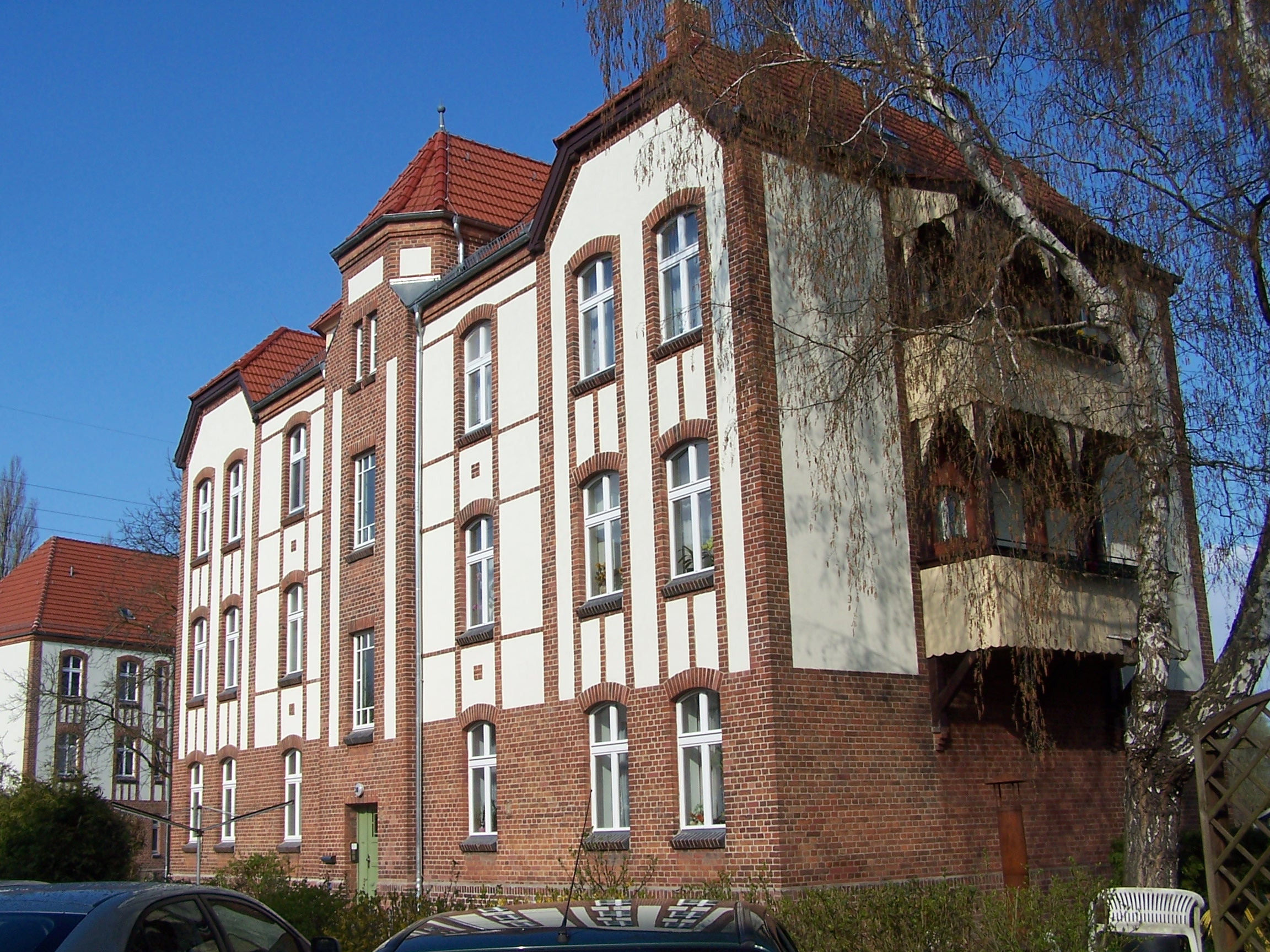 Haus in der Schwarztkopff-Siedlung in Wildau